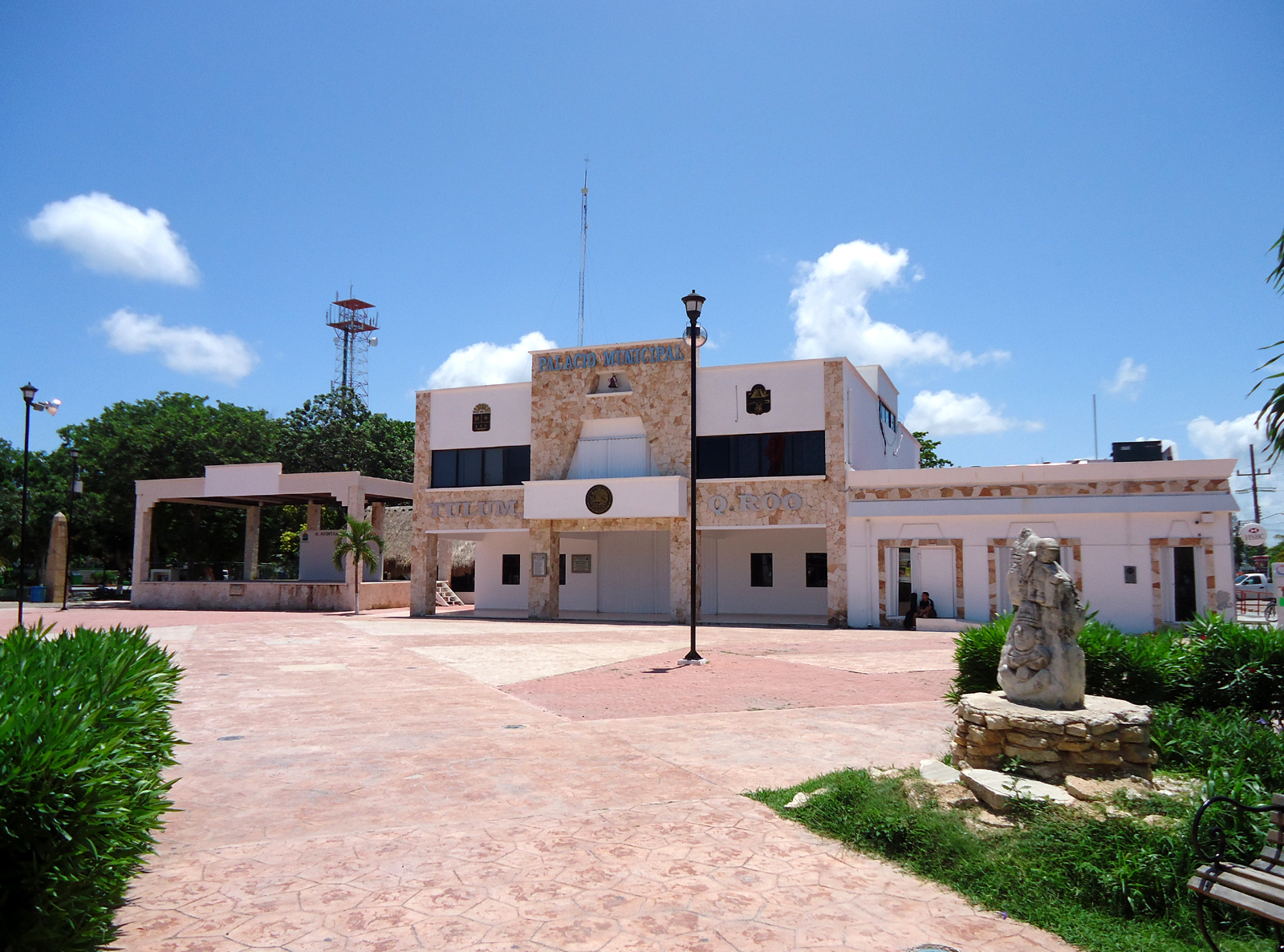 Rådhuset i Tulum kommune i Quintana Roo i Mexico